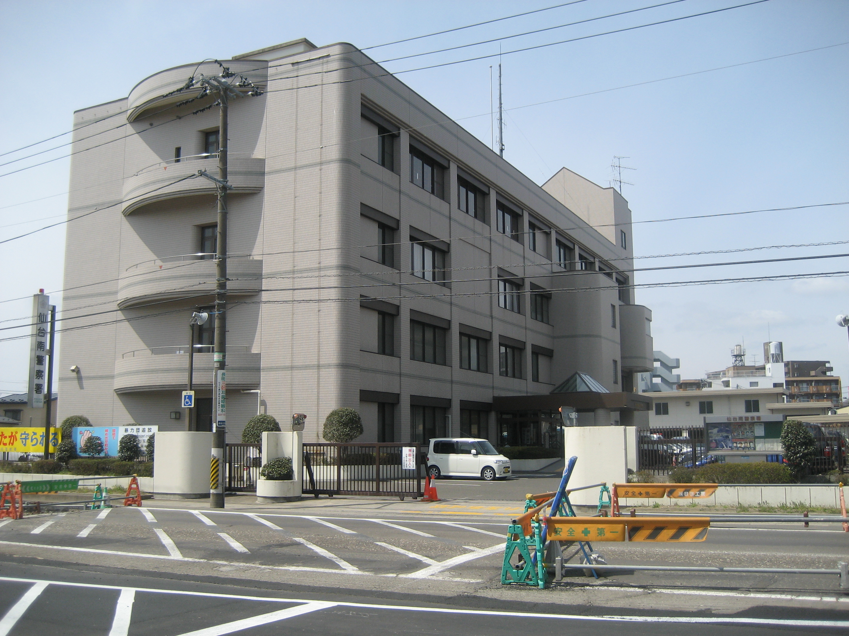 仙台南警察署庁舎